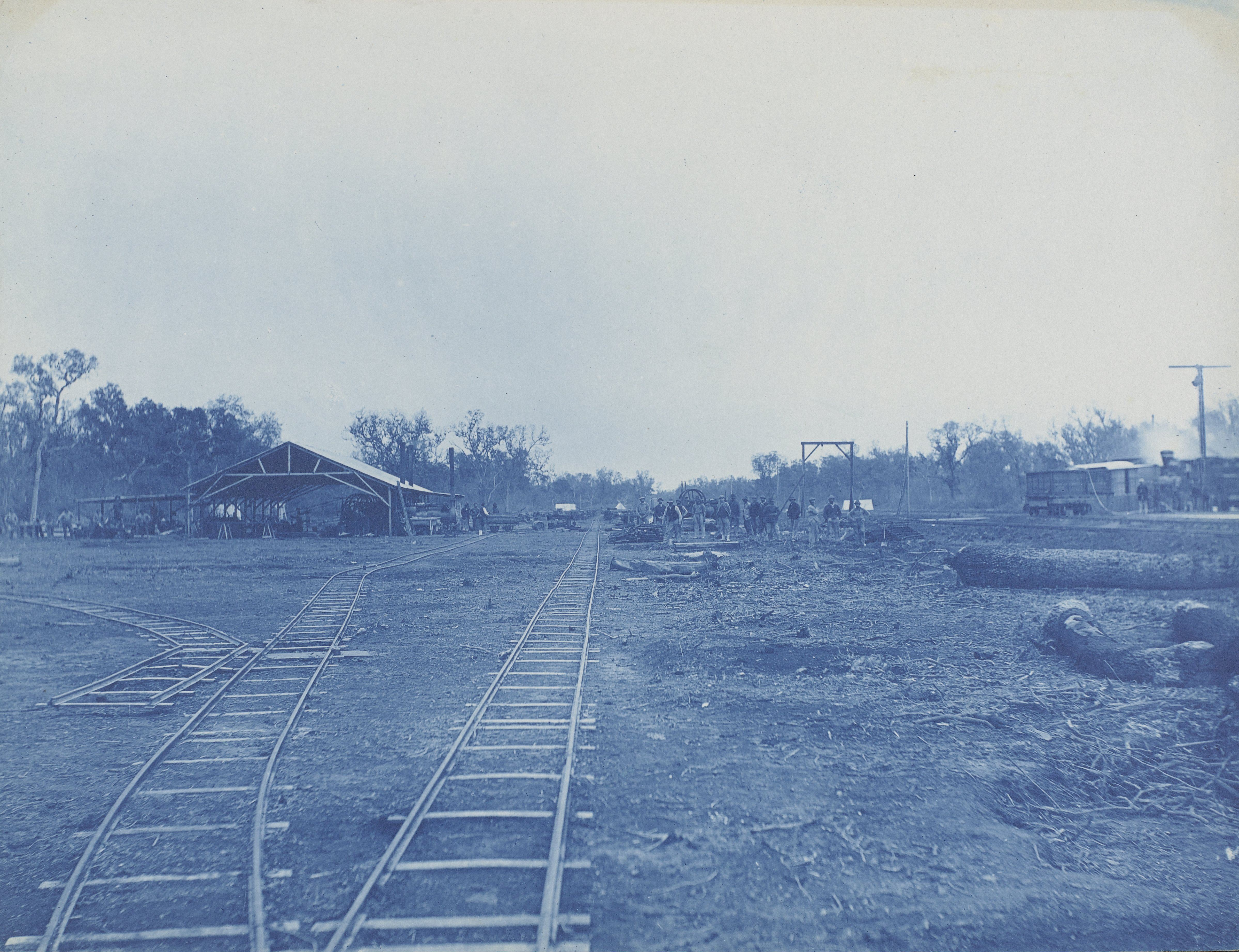 IdentificatieTitel(s): Spoorlijn van San Cristobal naar San Miguel de Tucumán in ArgentiniëObjecttype: foto Objectnummer: RP-F-2004-266Opschriften / Merken: opschrift, verso, geschreven in potlood: ‘Ligne de S. Cristobal à Tucuman / Compie Fives Lille / Scierie de [...] / Kil 147’VervaardigingVervaardiger: fotograaf: Georges Poulet (toegeschreven aan)Plaats vervaardiging: onbekendDatering: ca. 1890 - ca. 1895Fysieke kenmerken: cyanotypie op fotopapier op kartonMateriaal: fotopapier papier karton Techniek: cyanotypie / blauwdrukprocedéAfmetingen: foto: h 214 mm × b 279 mmOnderwerpWat: station; shelter (railway, tramway)Waar: ArgentiniëVerwerving en rechtenVerwerving: aankoop 2004Copyright: Publiek domein